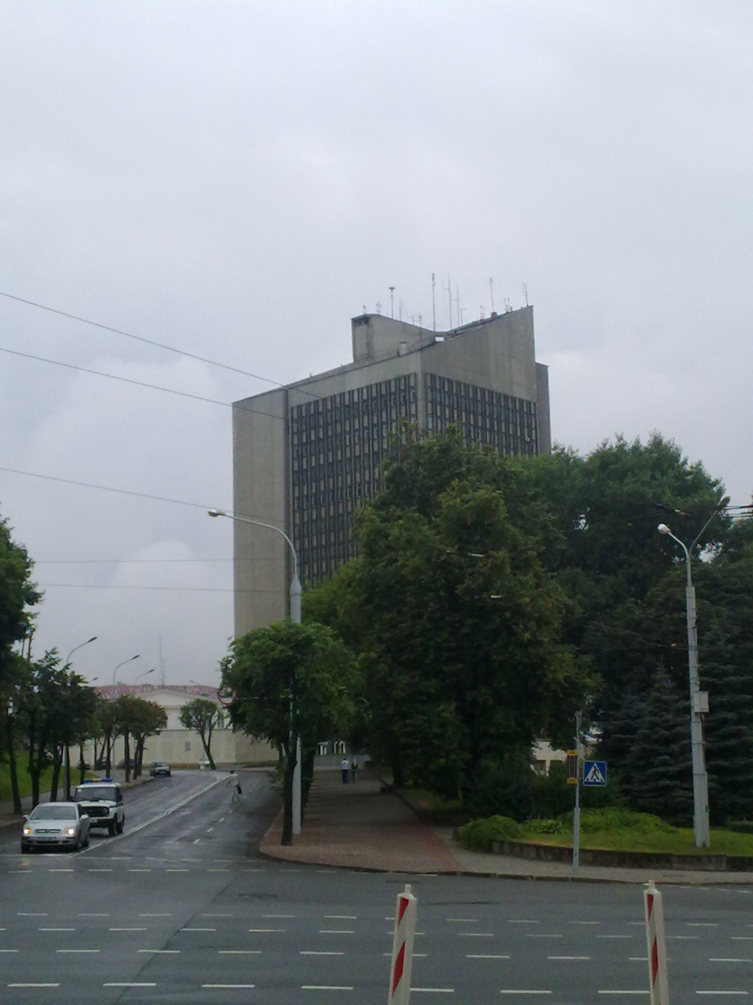 Мінск. Гарадскі Вал. 2012